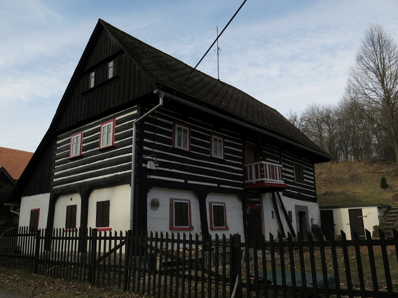 Usedlost če. 20, Nová Skalka če. 20, Skalka u Doks.